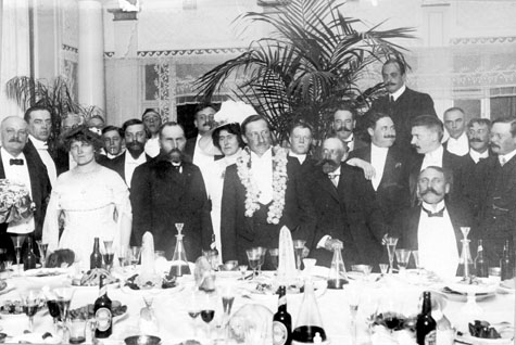 Cook ospite d'onore al pranzo della Royal Geographic Society all'hotel Phoenix di Copenaghen